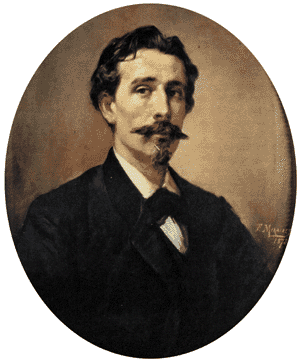 Francisco de Paula Rojas y Caballero-Infante